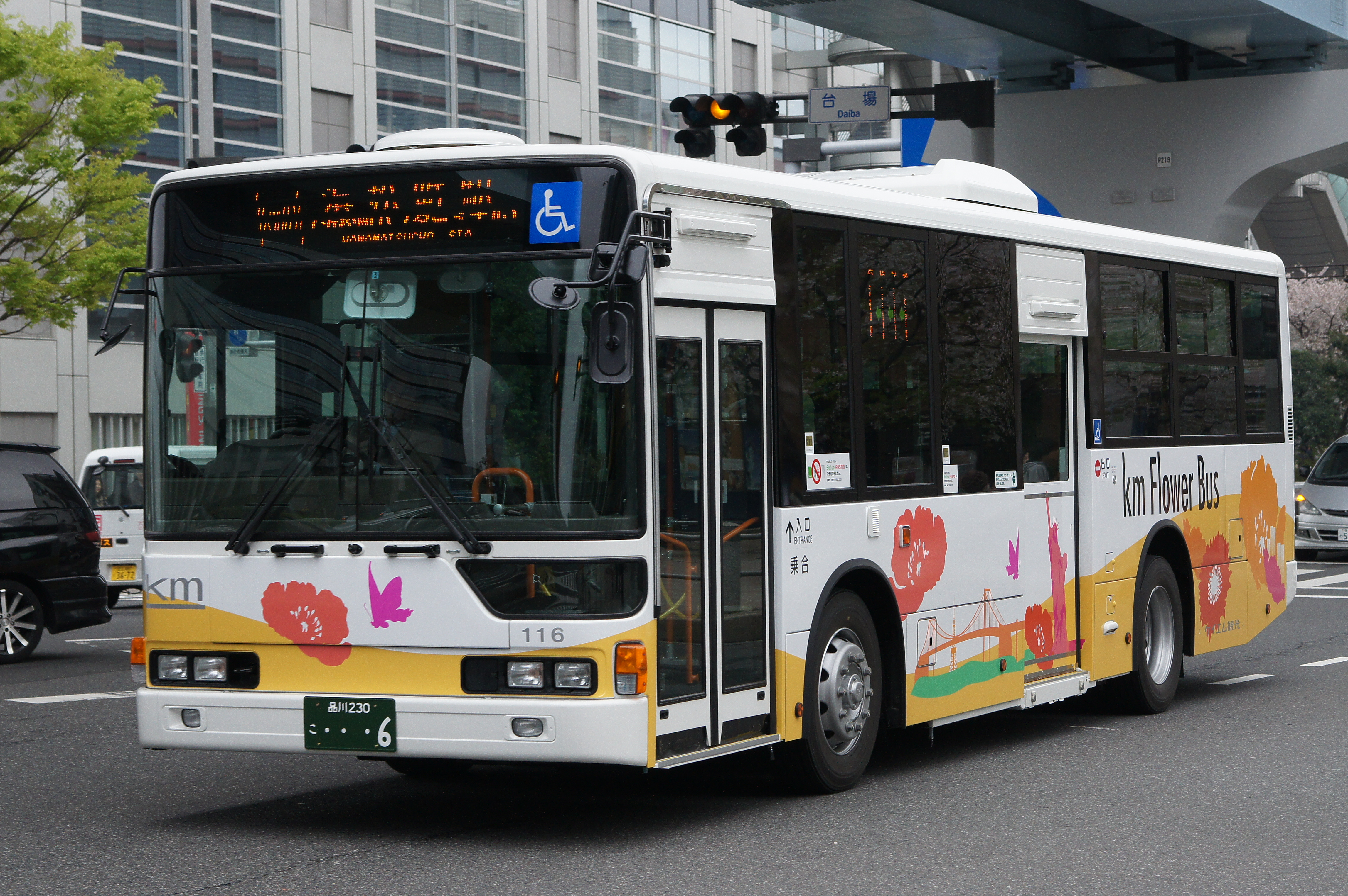 4/1より運行開始の「Km Flower Bus」に使用されている三菱ふそうエアロスターノンステップです。(QKG-MP37FK)港区台場交差点にて